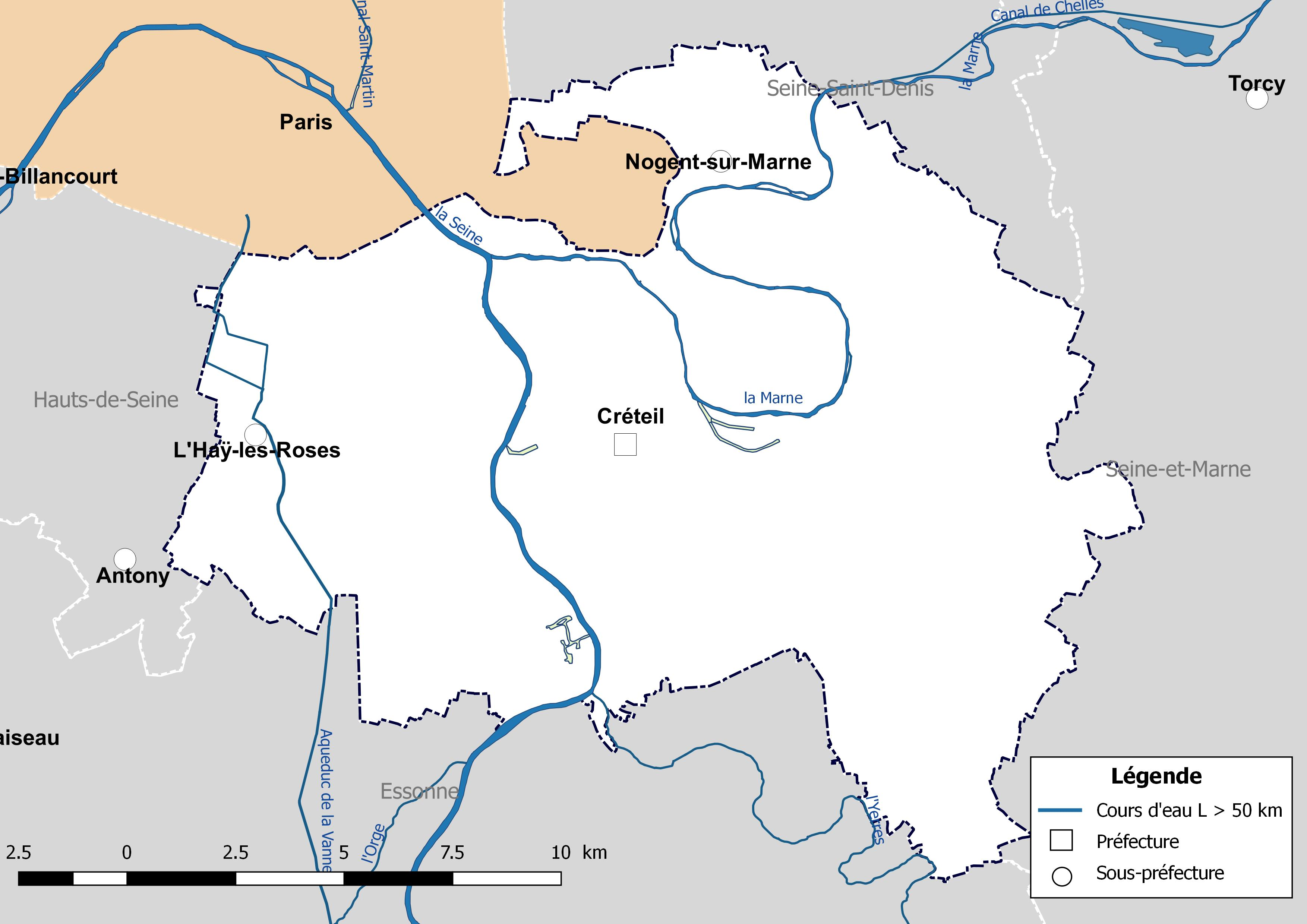 Carte des cours d'eau de longueur supérieure à 50 km drainant le département du Val-de-Marne (France).